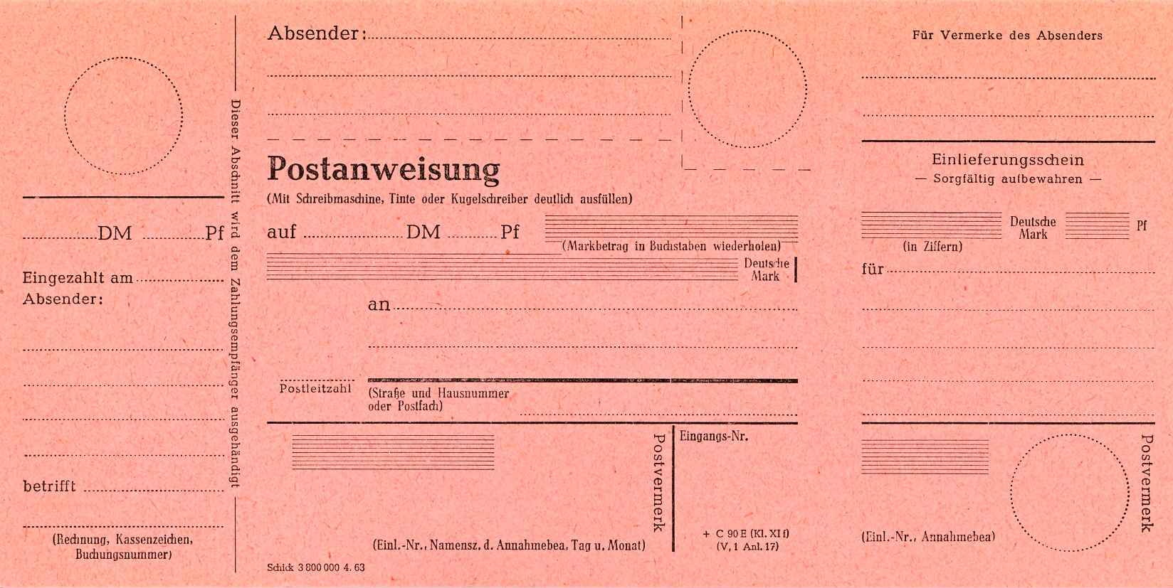 Postanweisung der Deutschen Bundespost aus dem Jahre 1963